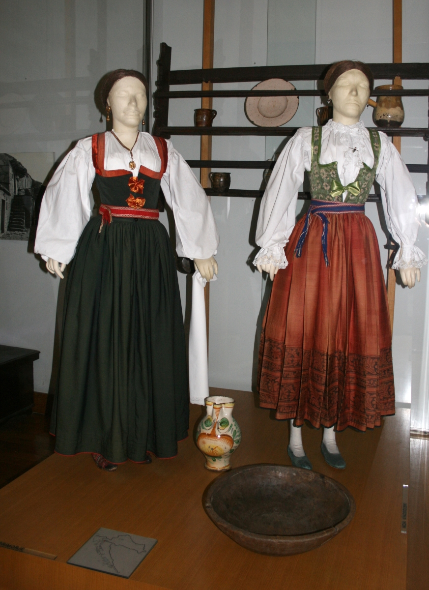 snimljeno tijekom Noći muzeja u Etnografskom muzeju u Zagrebu